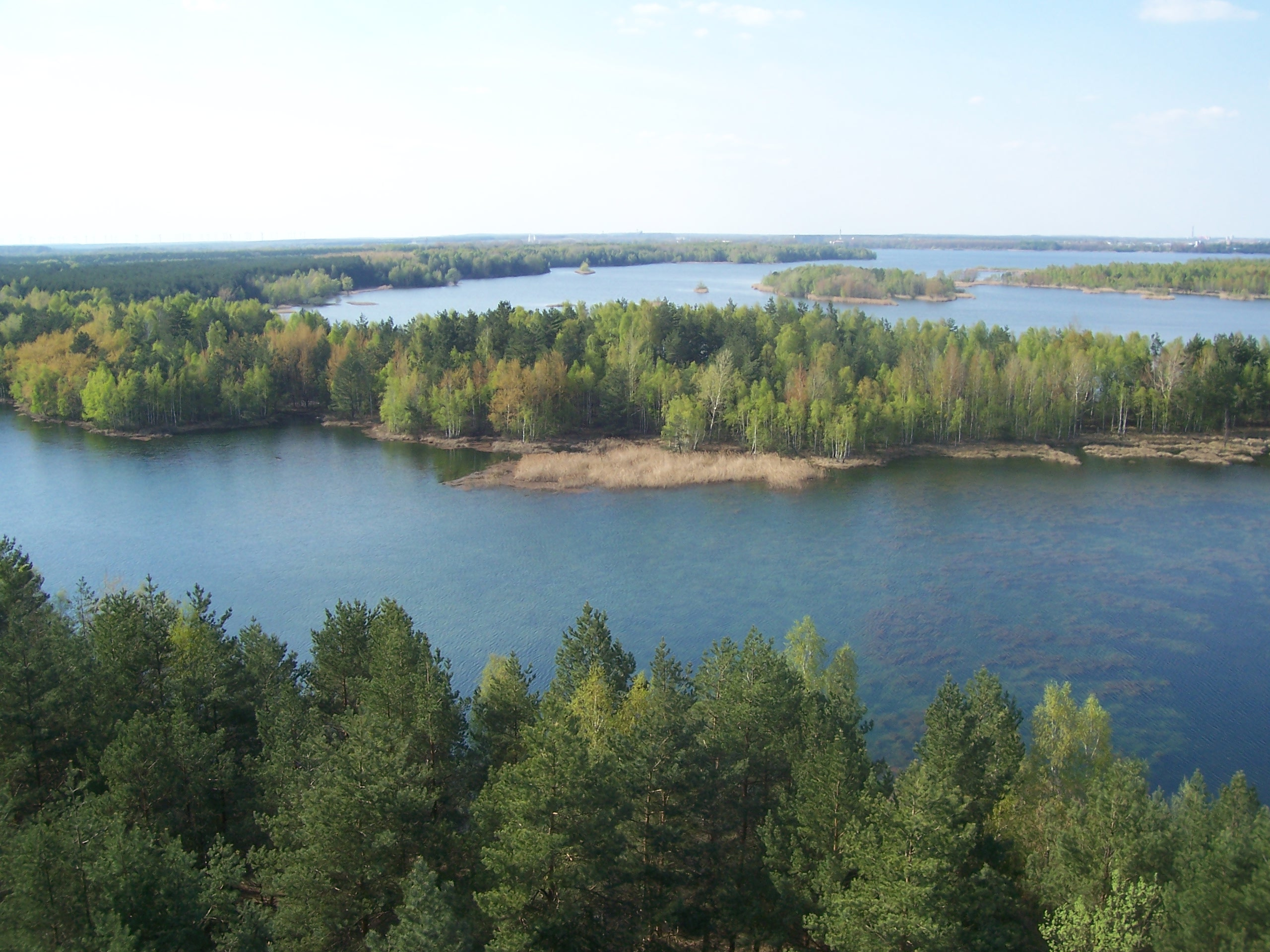 Aussicht von der obersten Aussichtsplattform am Senftenberger See (Südufer)